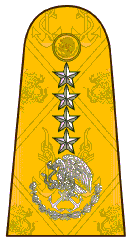 Almirante Secretario de Marina de los Estados Unidos Mexicanos